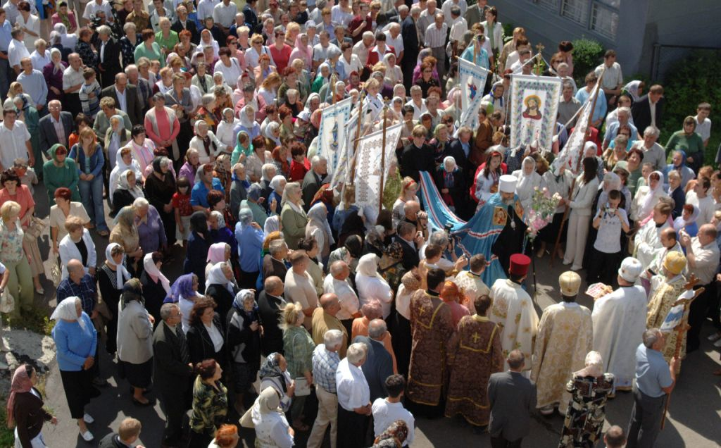 Митрополит Київський і всієї України Предстоятель УАПЦ Мефодій проводить літургію в Андріївській церкві у Дрогобичі (Львівська обл.) у неділю, 8 липня 2007 р. Дана подія пов’язана з бажанням Самборсько-Дрогобицької єпархії УПЦ увійти до молитовного та евхарастійного союзу з Українською Православною Автокефальною церквою, що буде сполучним чинником на шляху до Української Помісної православної церкви.